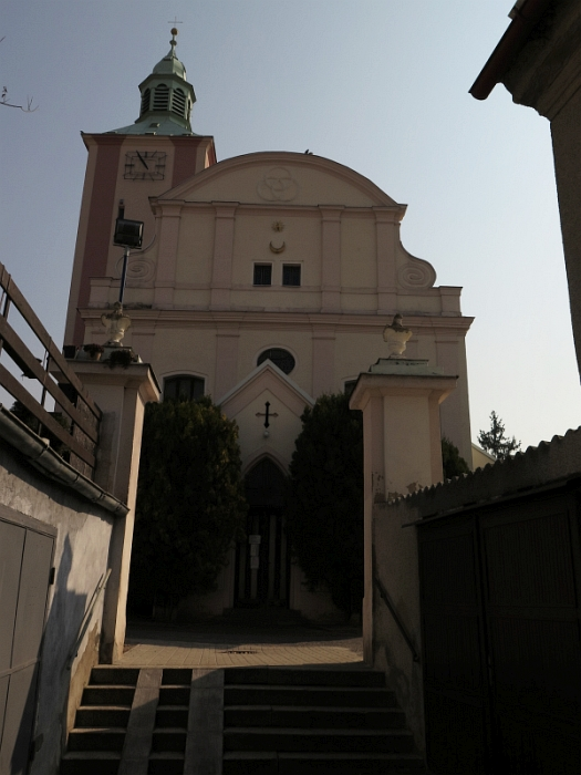 Kostel svatého Otmara s hranolovou věží, Hoštka.